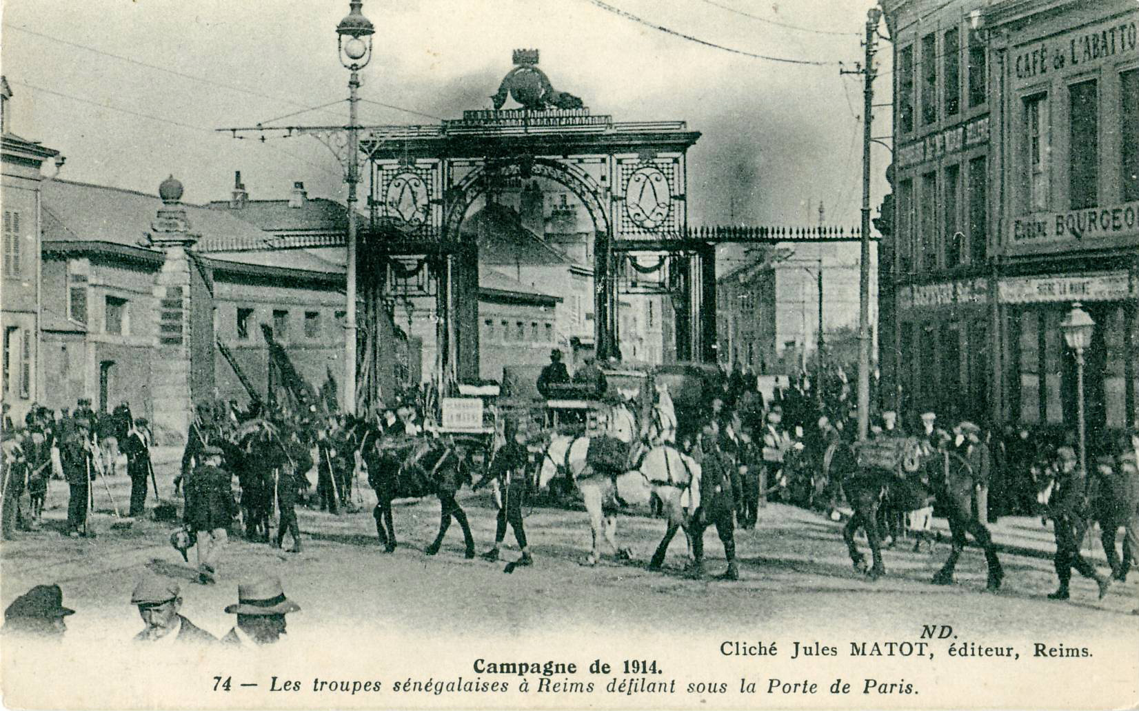 Carte postale ancienne éditée par ND, cliché Jules Matot, éditeur à Reims, n°74Campagne de 1914 - Les troupes sénégalaises défilant à Reims sous la Porte de Paris.